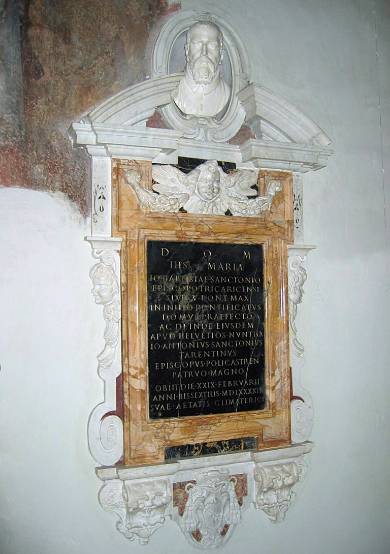 Funerary monument of Bishop Giovanni Battista Santoni († 1592). Bust of the deceased by Giovanni Lorenzo Bernini (c. 1612), Basilica di Santa Prassede, Roma.